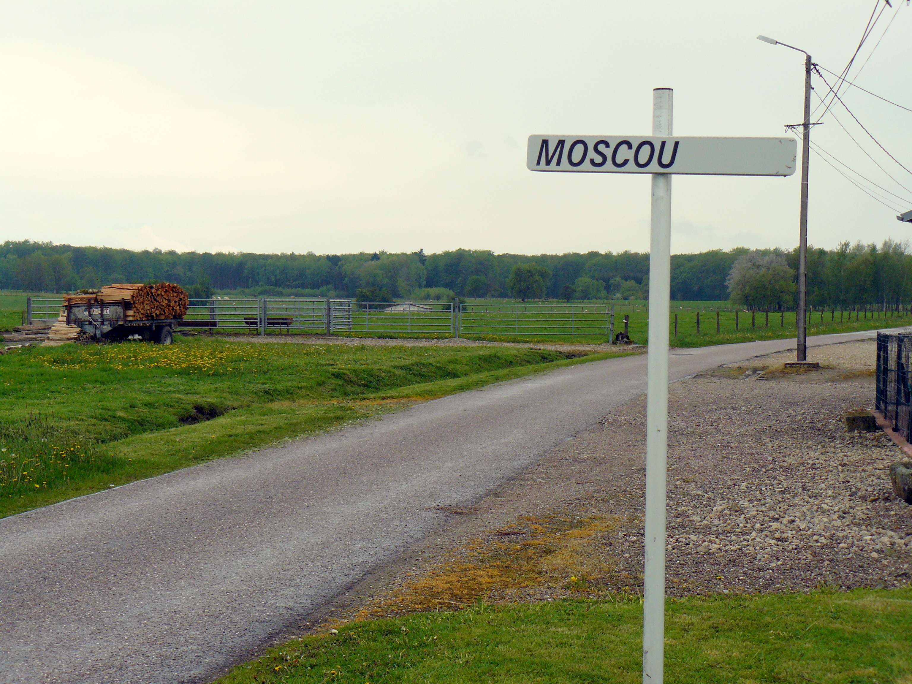 Moscou, lieu-dit de Gruey-lès-Surance (Vosges, France)